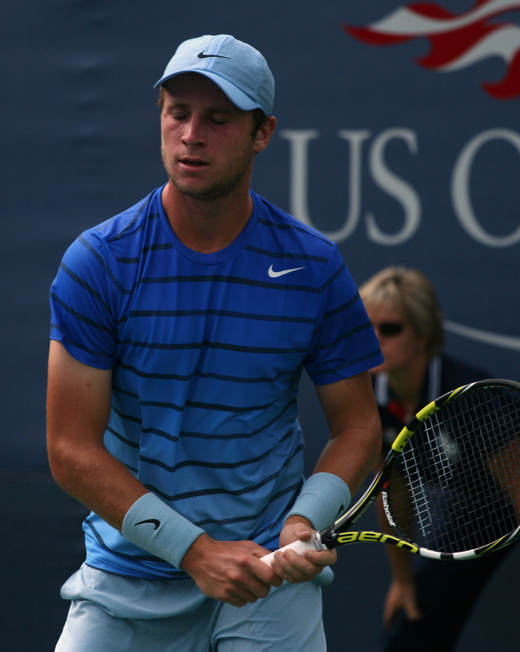 Sunday, Sept. 1, 2013